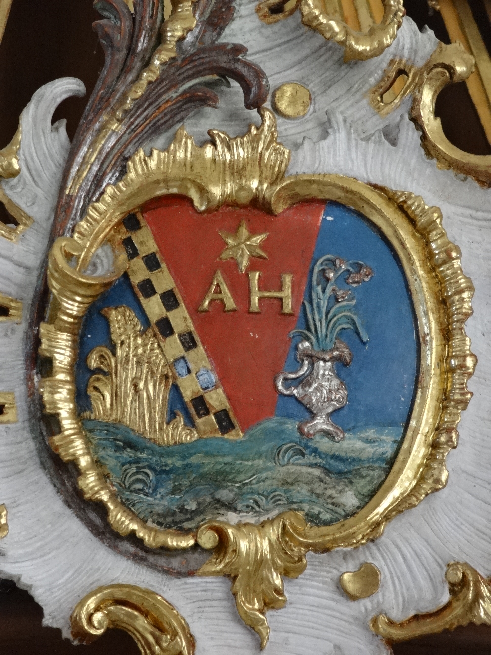 Klosterkirche (JVA Rockenberg)